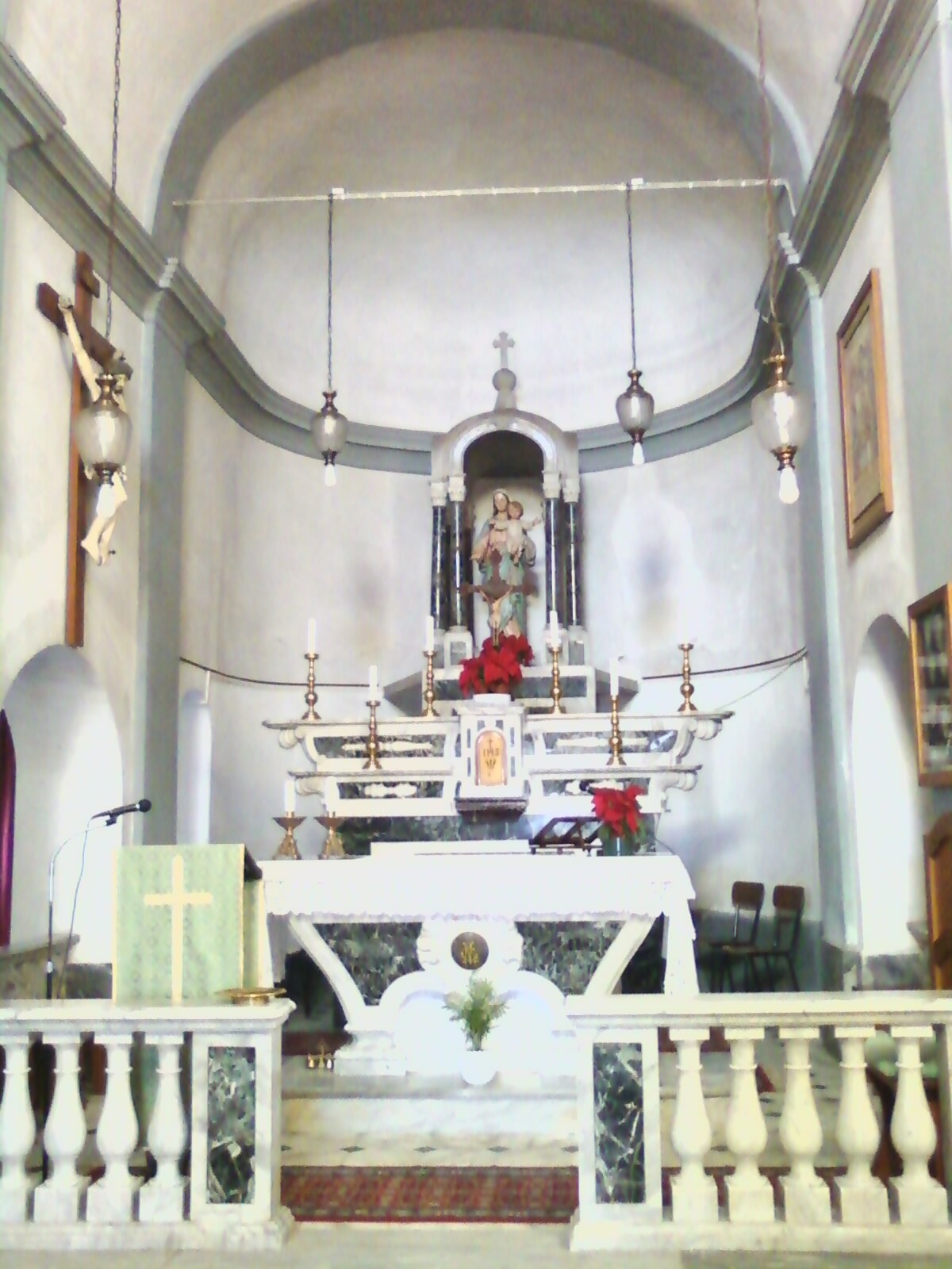 Interno della chiesa della frazione Faje di Varazze (Italy)